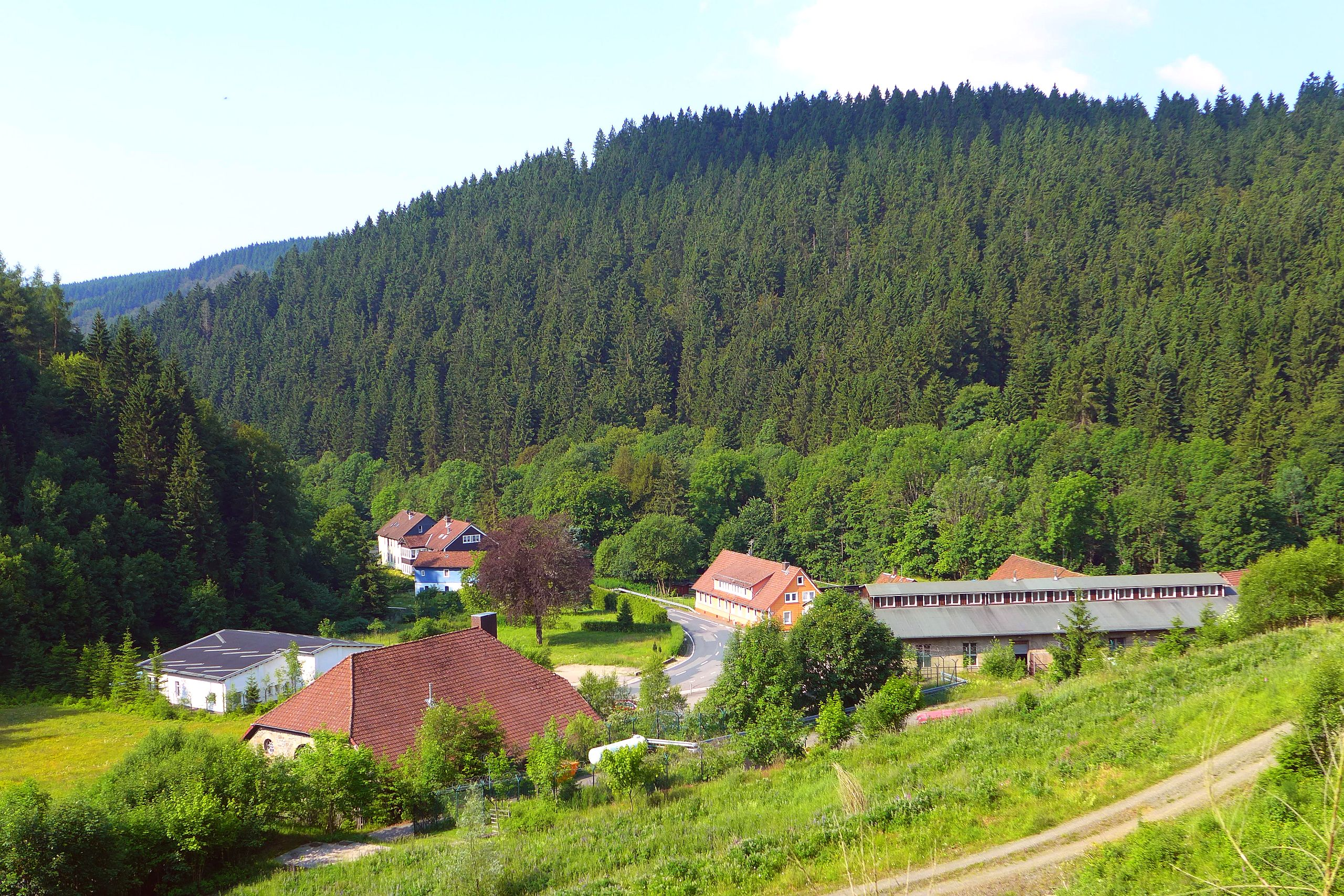 Blick von Osten auf den Ortsteil Silberhütte von Sankt Andreasberg